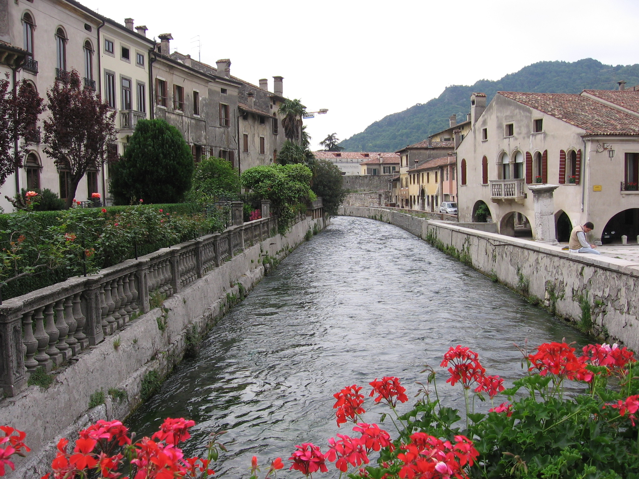 Il fiume Meschio visto da Serravalle (Vittorio Veneto, Treviso), con a destra Casa Gandini (XIV secolo)